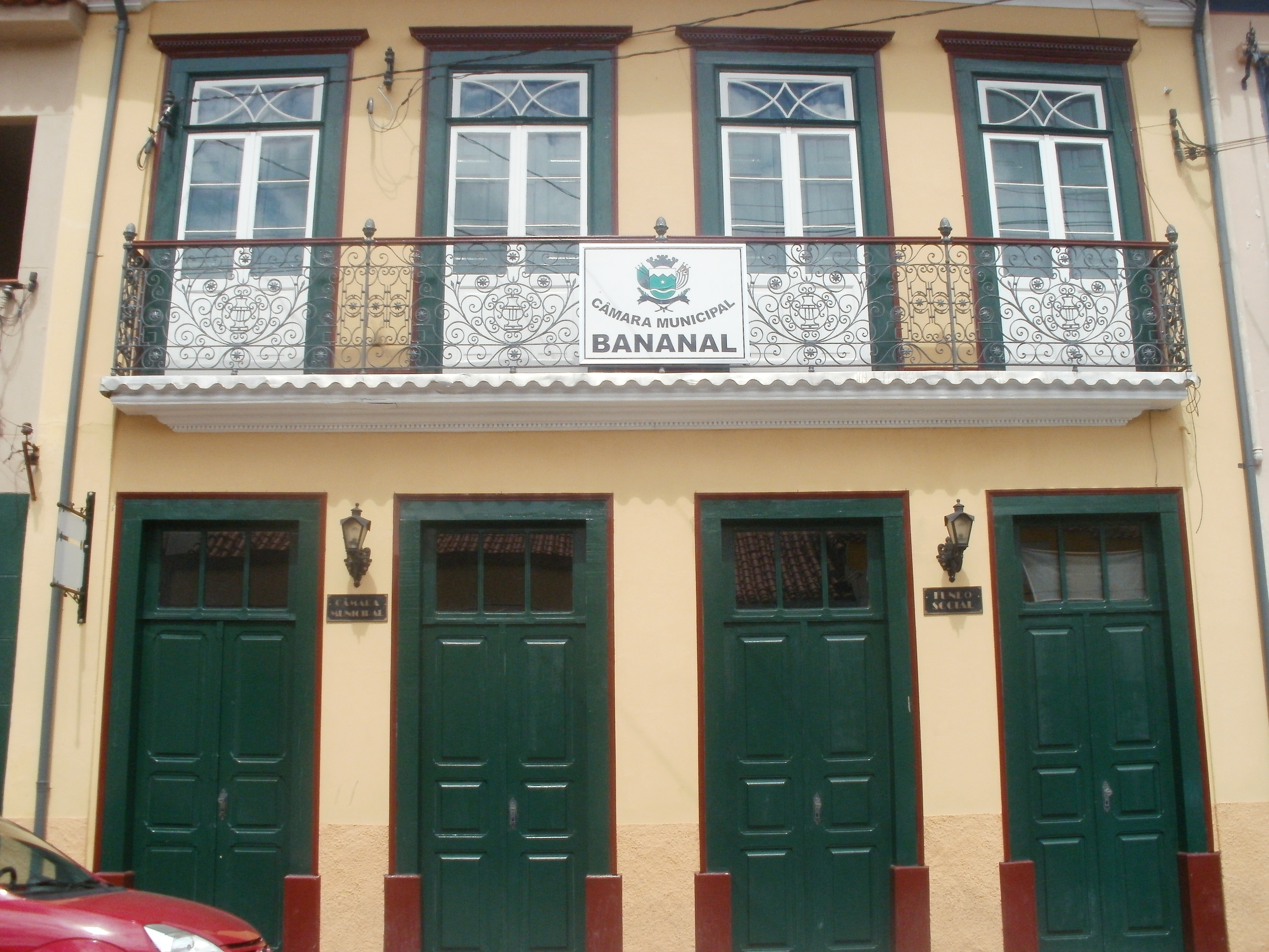 Câmara Municipal de Bananal, estado de São Paulo, Brasil.